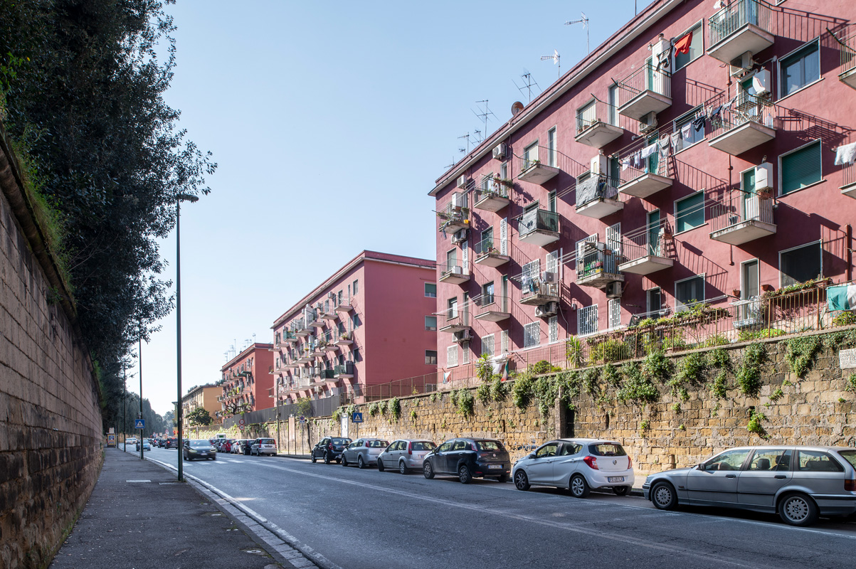 Rione INA-Casa Capodimonte Lieti, Giulio De Luca.